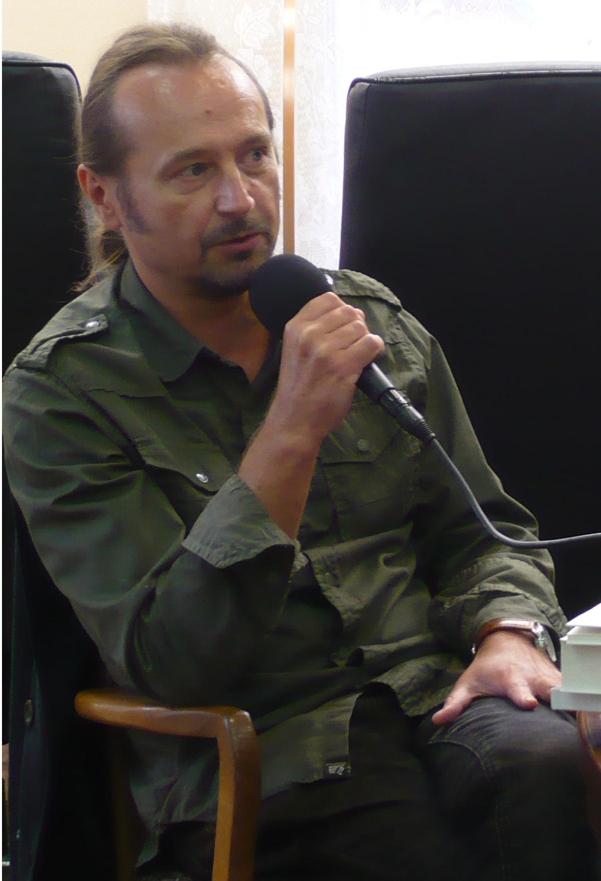 Jacek Bierut